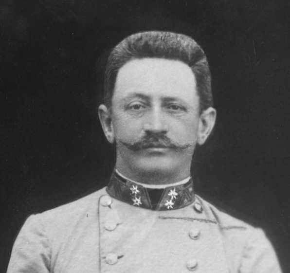 Franz Conrad von Hötzendorf (1852-1925), österreichischer General